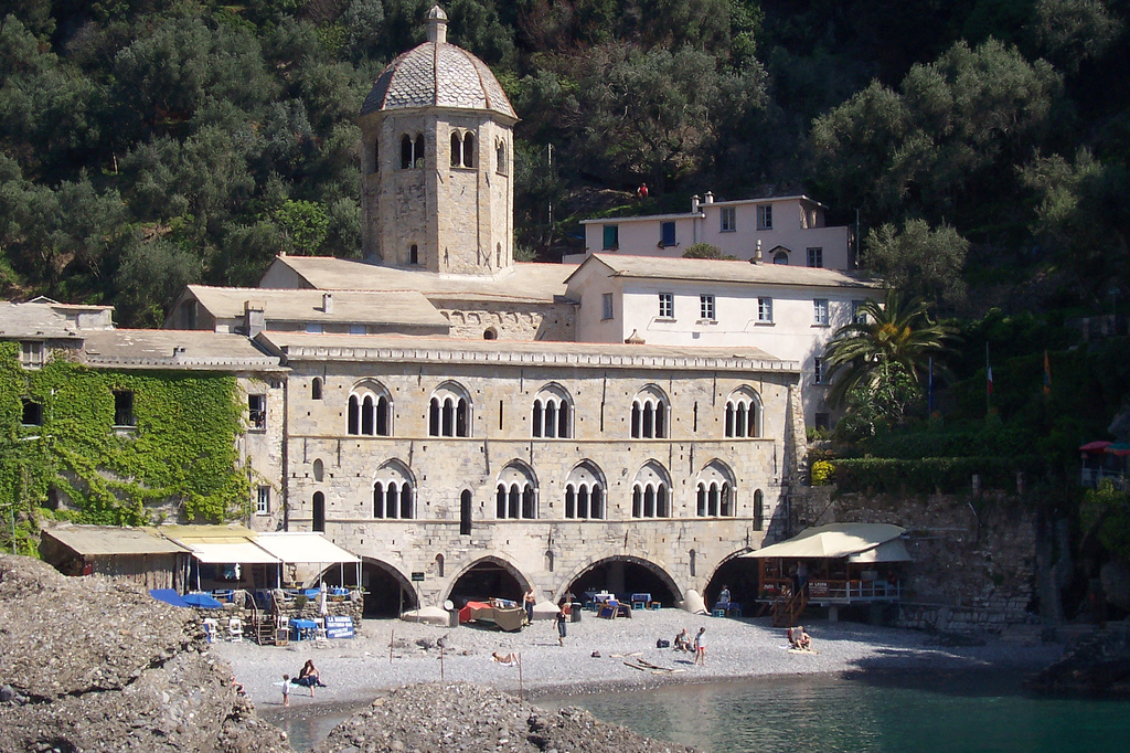 Camogli, Liguria, Italia